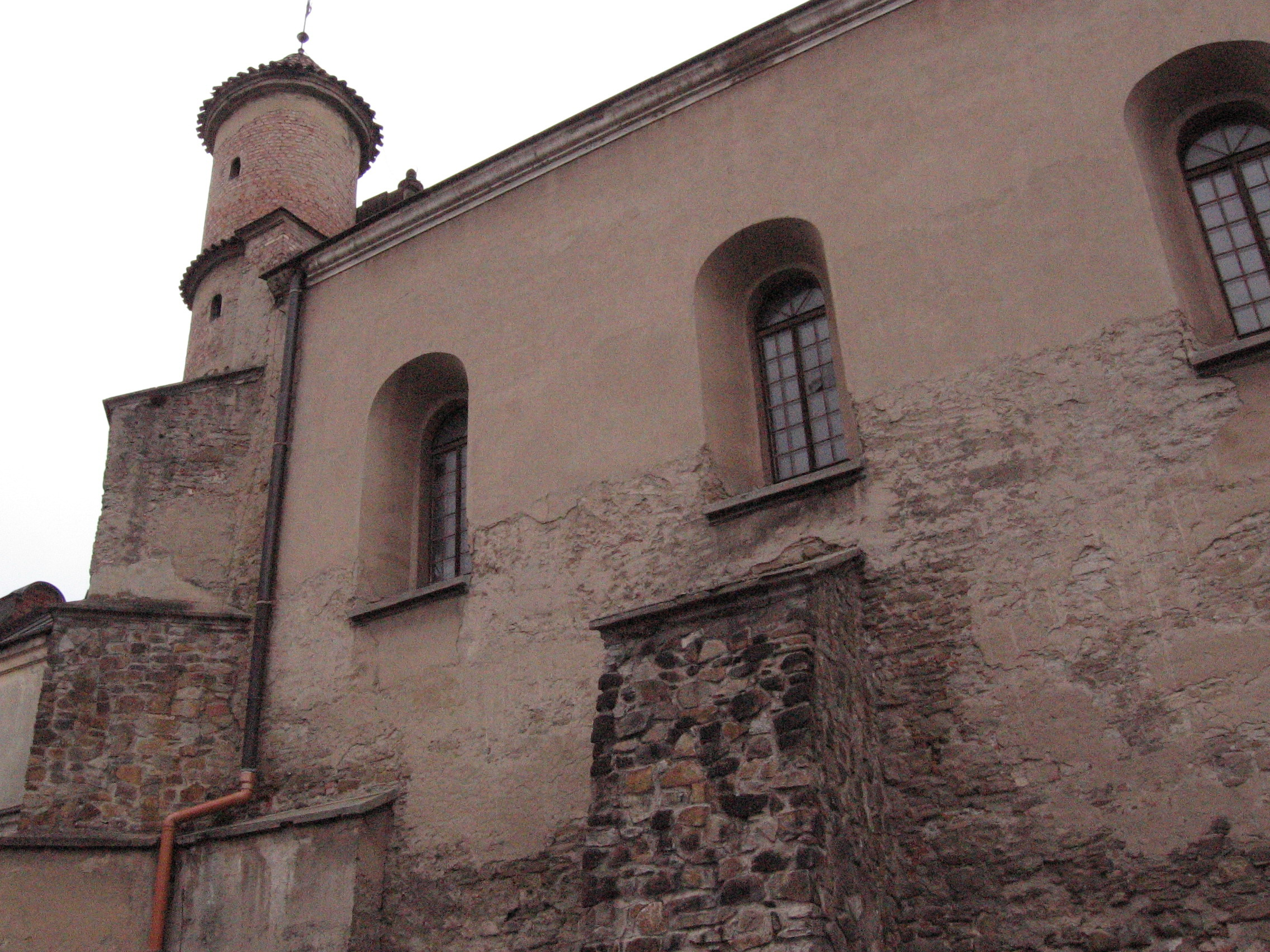 Lesko synagoga, ściana wschodnia